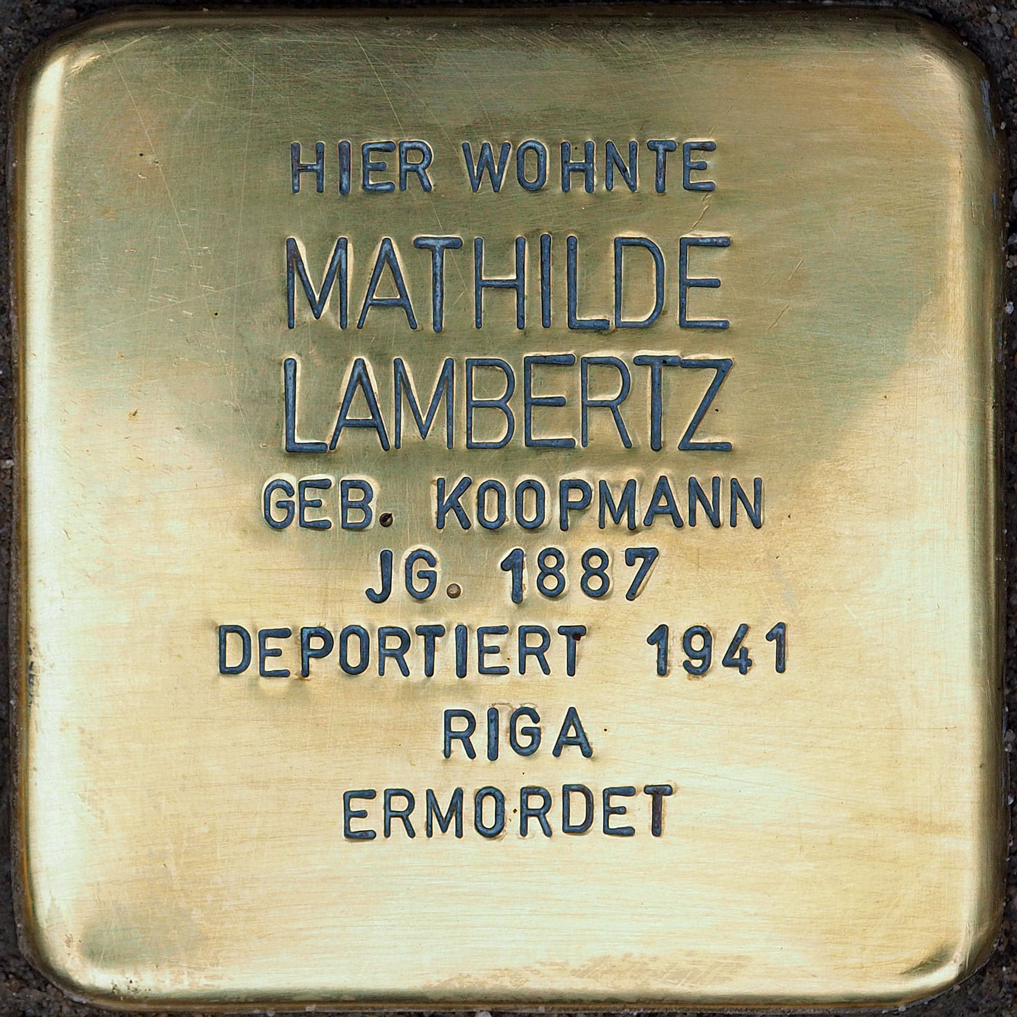 Stolpersteine in Kempen: Lambertz, Mathilde